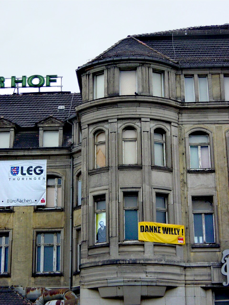 Hotel Erfurter Hof in Erfurt (Thüringen) mit Willy-Brandt-Poster in Erinnerung an dessen Besuch im Jahr 1970